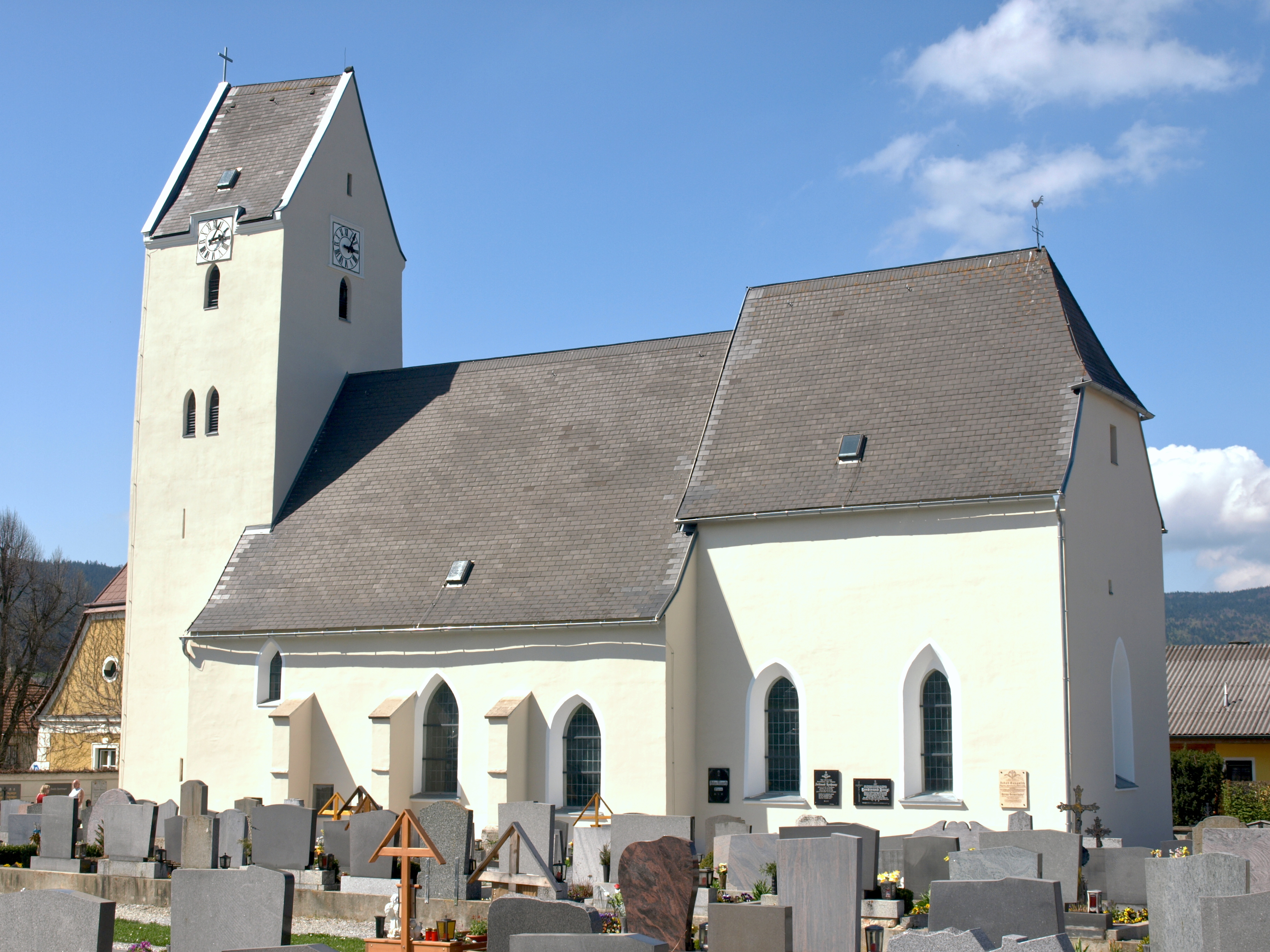 Kath. Pfarrkirche hl. Nikolaus und Friedhof